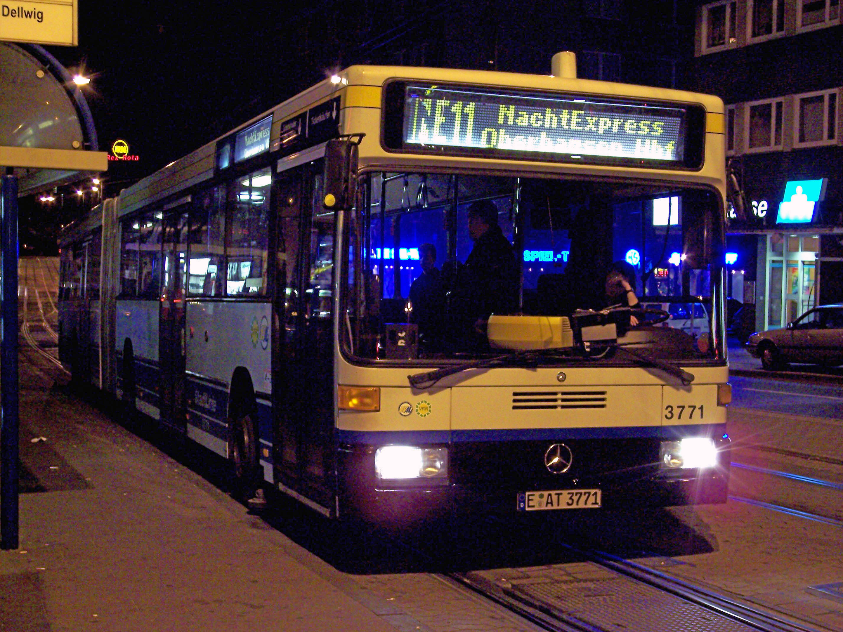 Essener Verkehrs-AG of Essen, Germany night bus on route NE11 at Helenenstraße. The vehicle is 1993 Mercedes-Benz O405GN1 number 3771.